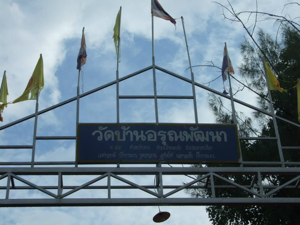 ป้านทางเข้าวัดบ้านอรุณพัตณา เลขที่ 96 หมู่ 11 ตำบลบ้านยาง อำเภอลำทะเมนชัย จังหวัดนครราชสีมา